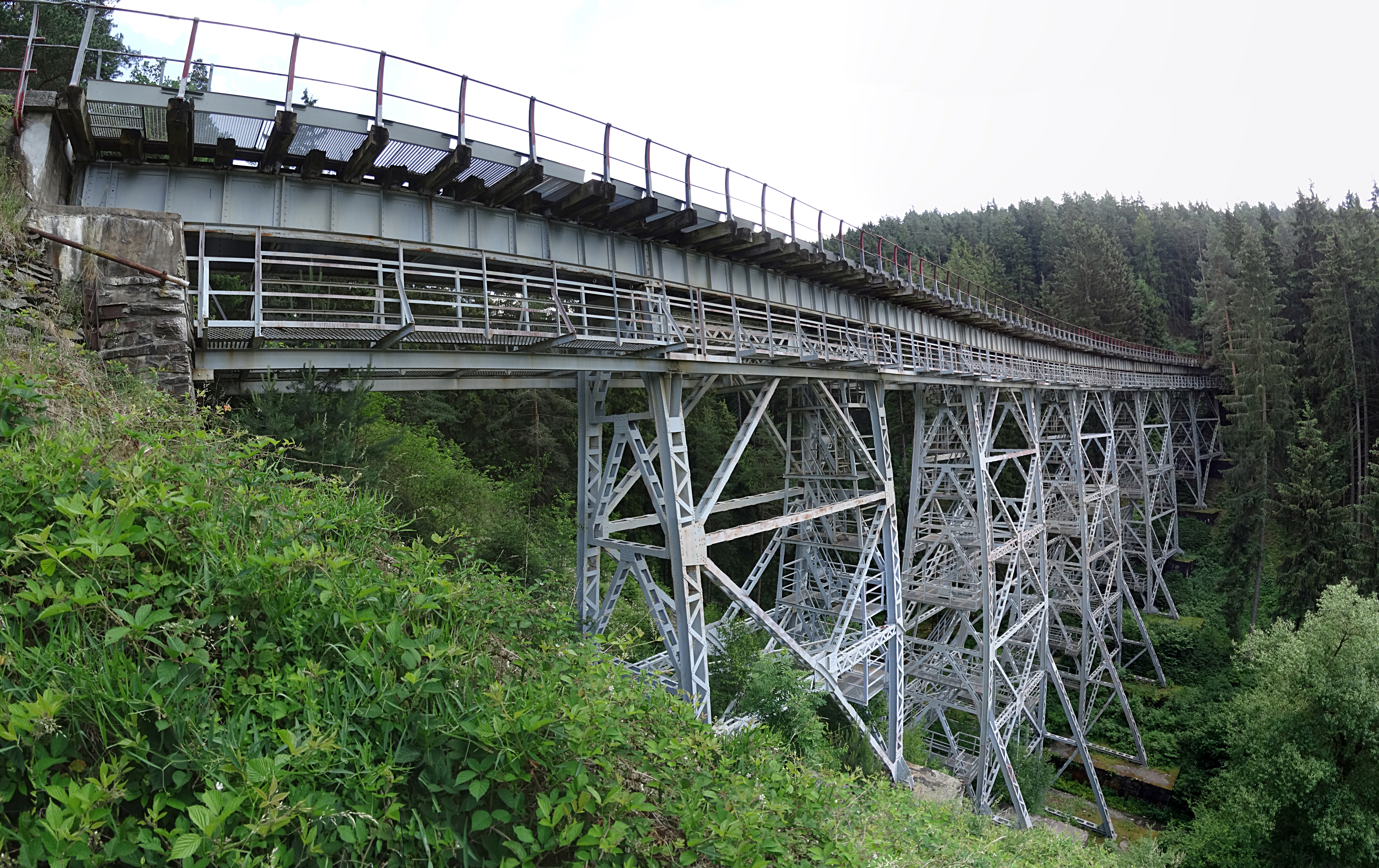 Ziemestalbrücke Panorama von Nordwest